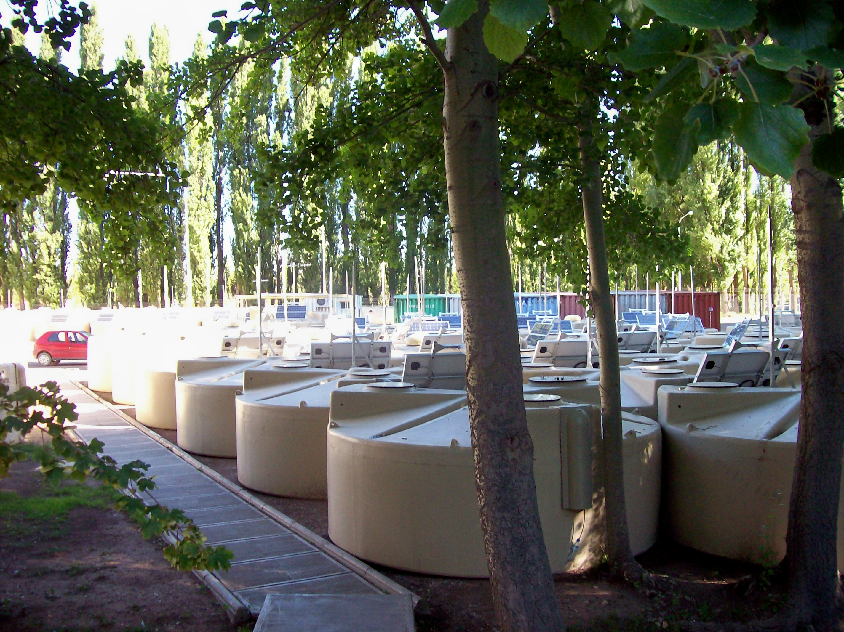 Observatorio Pierre Auger, en Malargüe, Argentina. Almacén de detectores de rayos cósmicos.